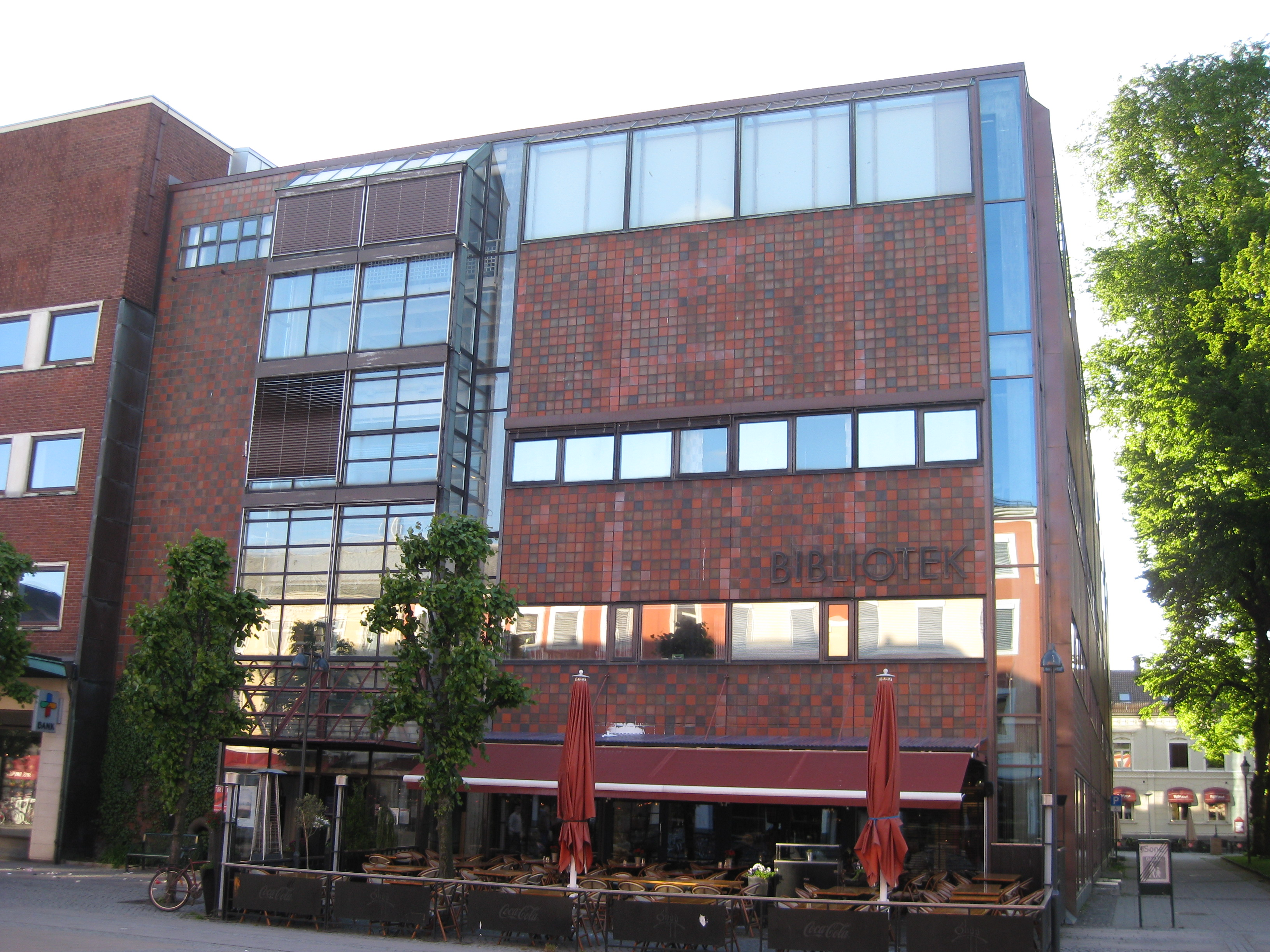 Kristiansand folkebibliotek ligger i Rådhusgata 11 i Kristiansand.